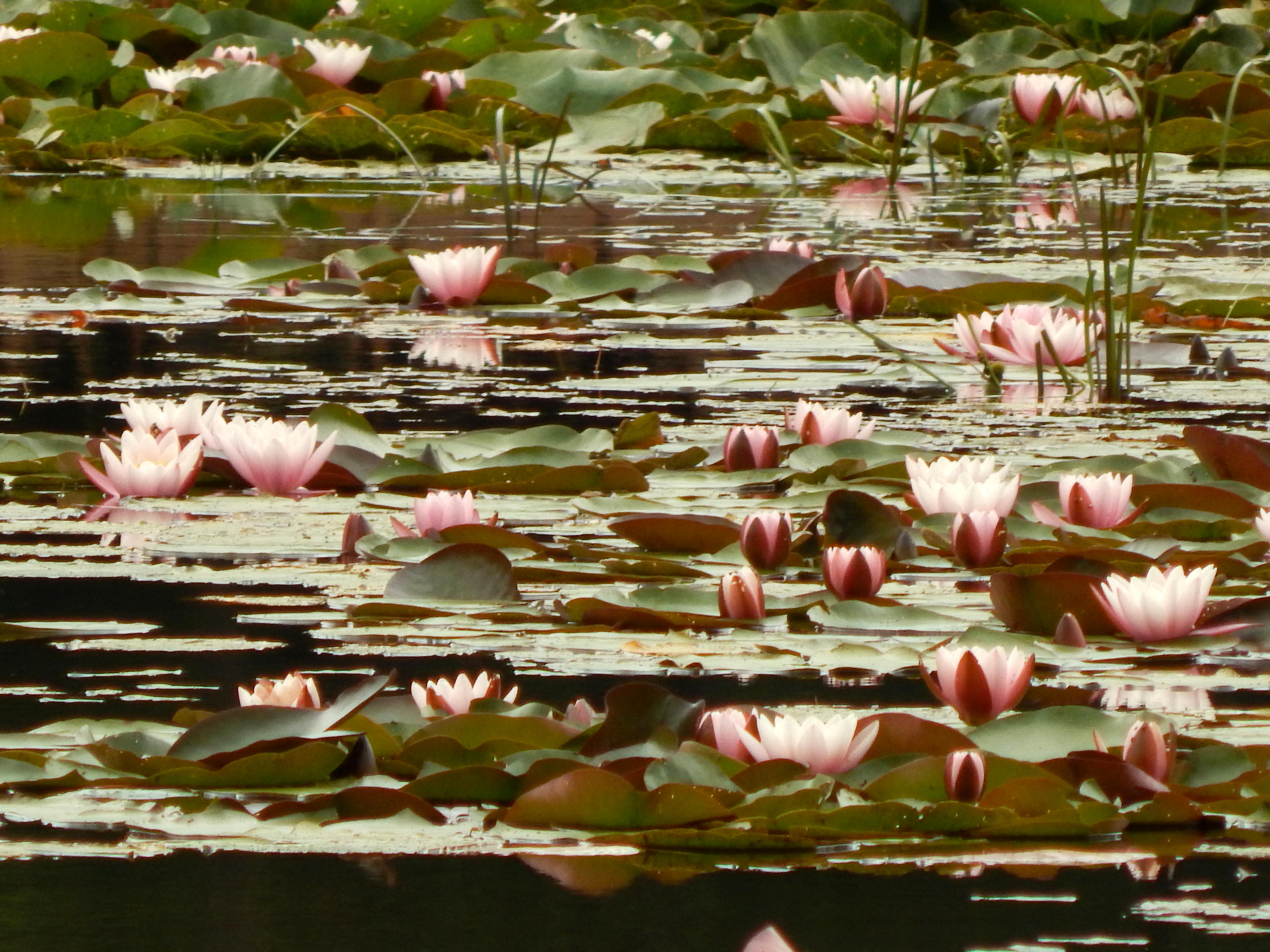 Lekníny na rybníku Boušovka.